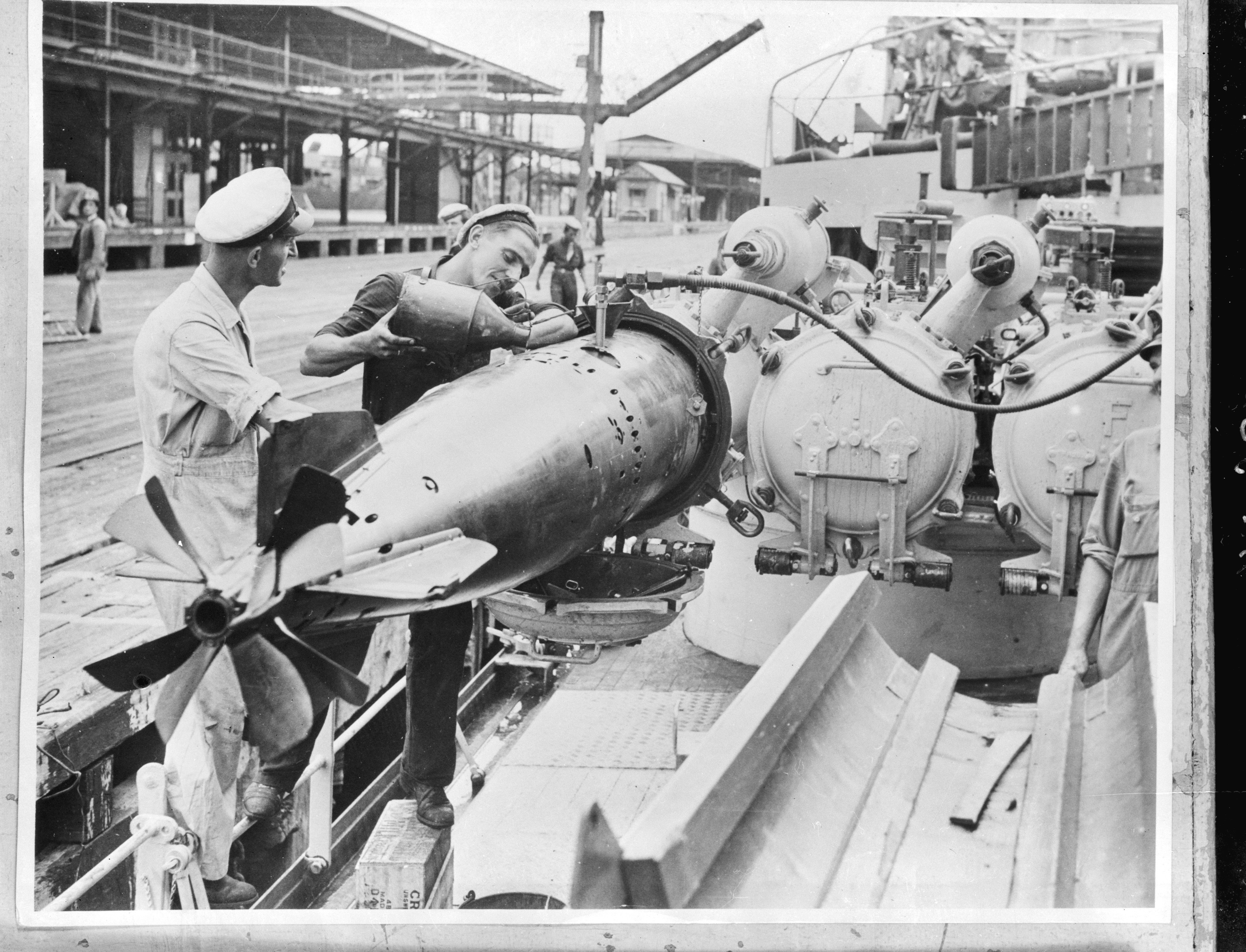 Collectie / Archief : Fotocollectie Anefo Reportage / Serie : [ onbekend ] Beschrijving : Hr Ms. "Tromp" in Australie Datum : 1945 Locatie : Australië Trefwoorden : VLOTEN, tweede wereldoorlog Fotograaf : Fotograaf Onbekend / Anefo Auteursrechthebbende : Nationaal Archief Materiaalsoort : Negatief (zwart/wit) Nummer archiefinventaris : bekijk toegang 2.24.01.04 Bestanddeelnummer : 900-5020